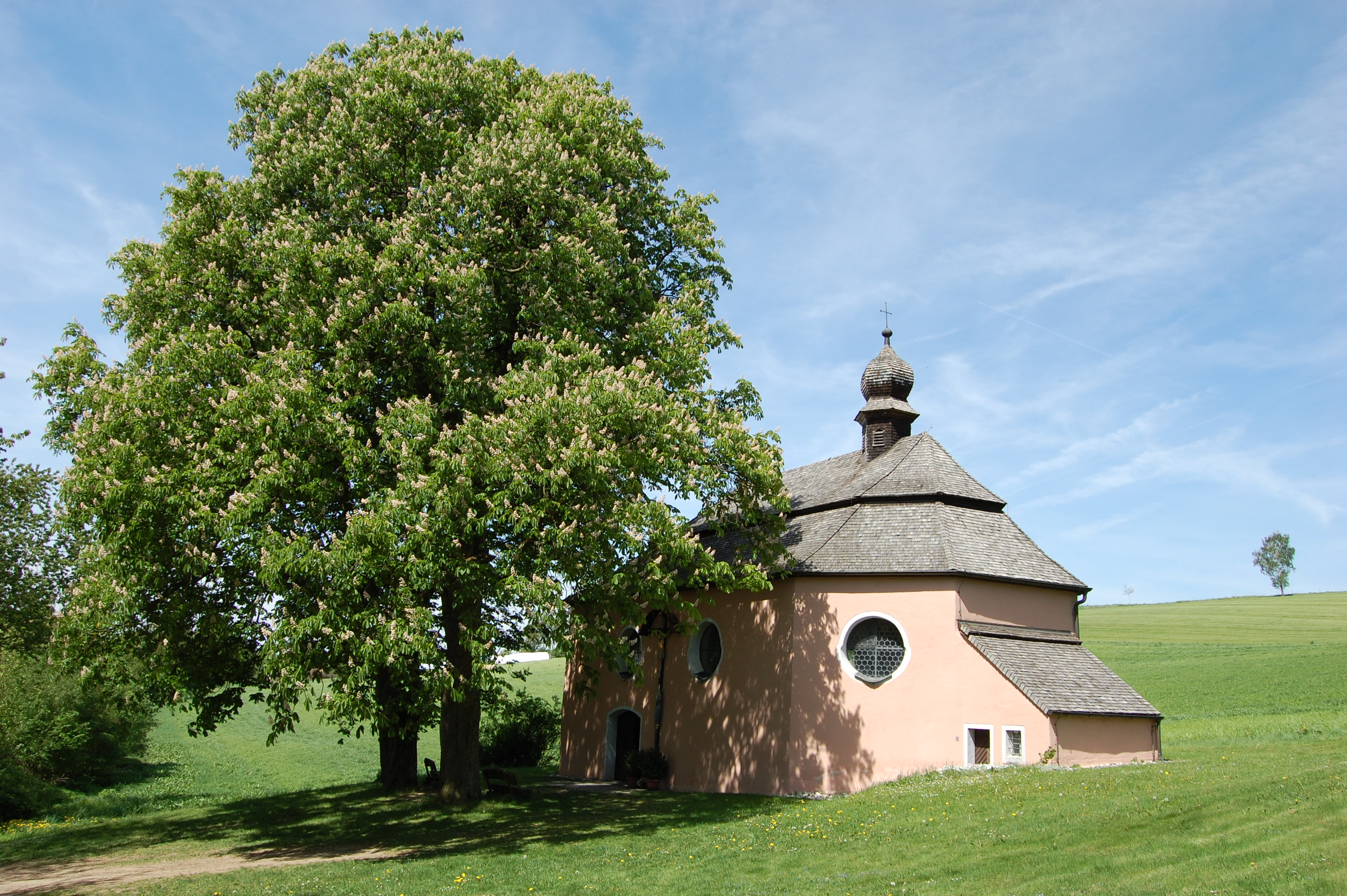 "Jakobikirche" bei Fuchsberg, Gemeinde Teunz, Landkreis Schwandorf, Oberpfalz, Bayern (2011)